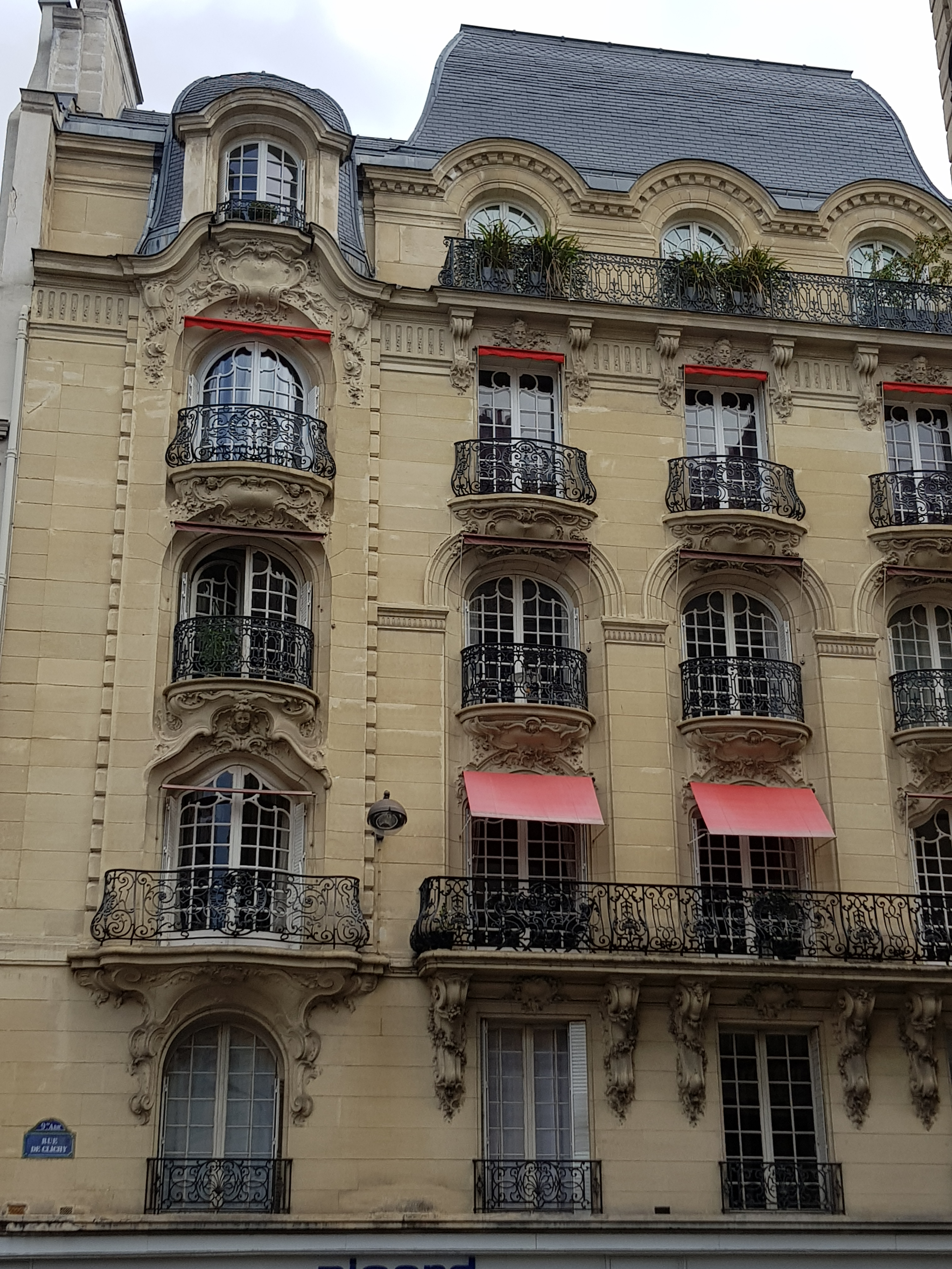 26-28, rue de Clichy, Paris 9e.